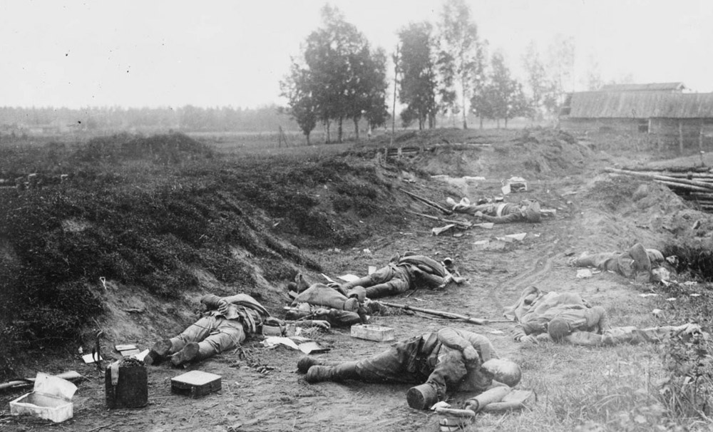 Погибшие от химического оружия русские пехотинцы, линии на реке Даугава, оборона Риги, сентябрь 1917